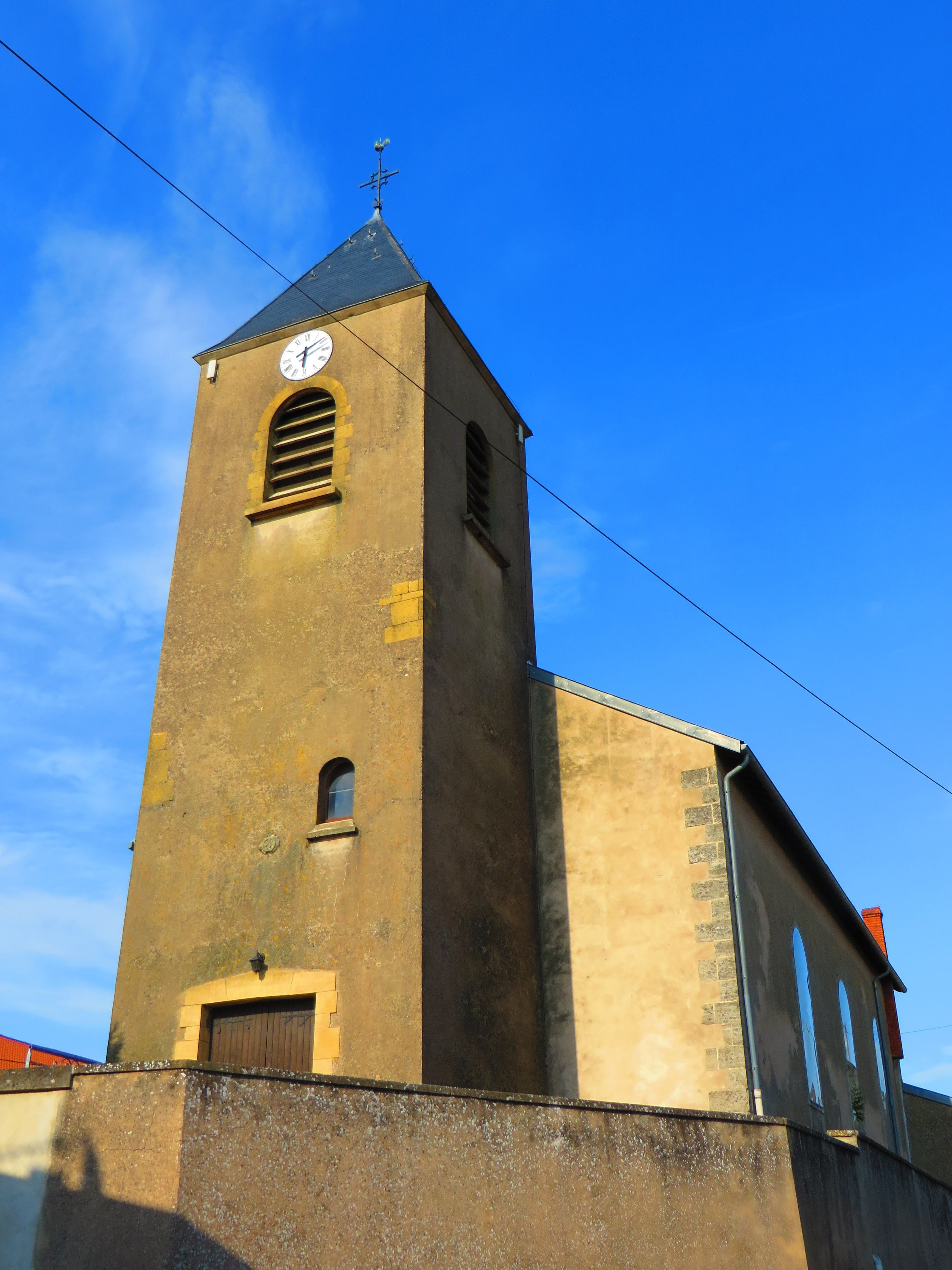 Brulange eglise